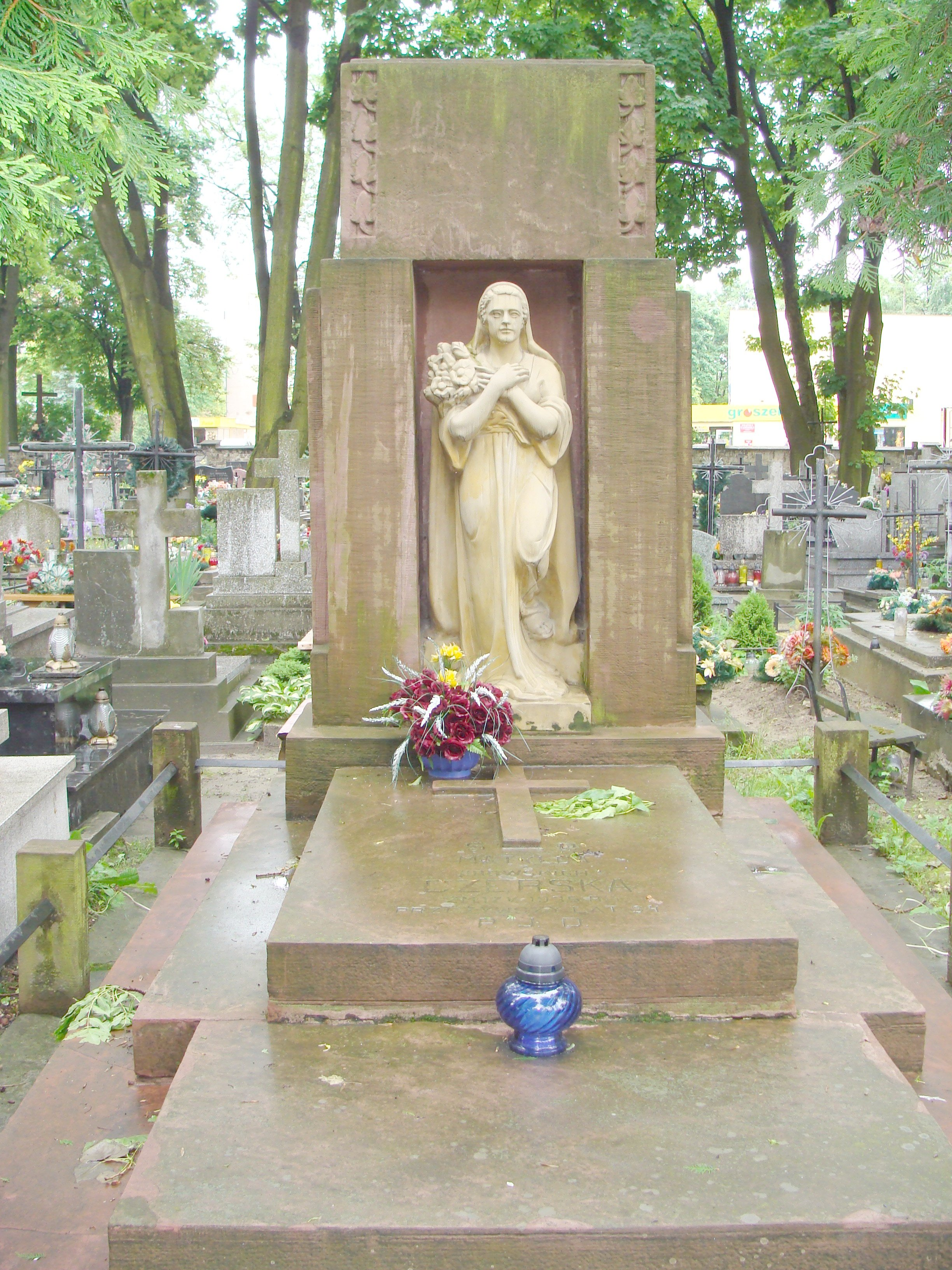 Nagrobek Matyldy Czerskiej wykonany przez Jakuba Juszczyka. Cmentarz przy ul.PeOWiaków w Zamościu